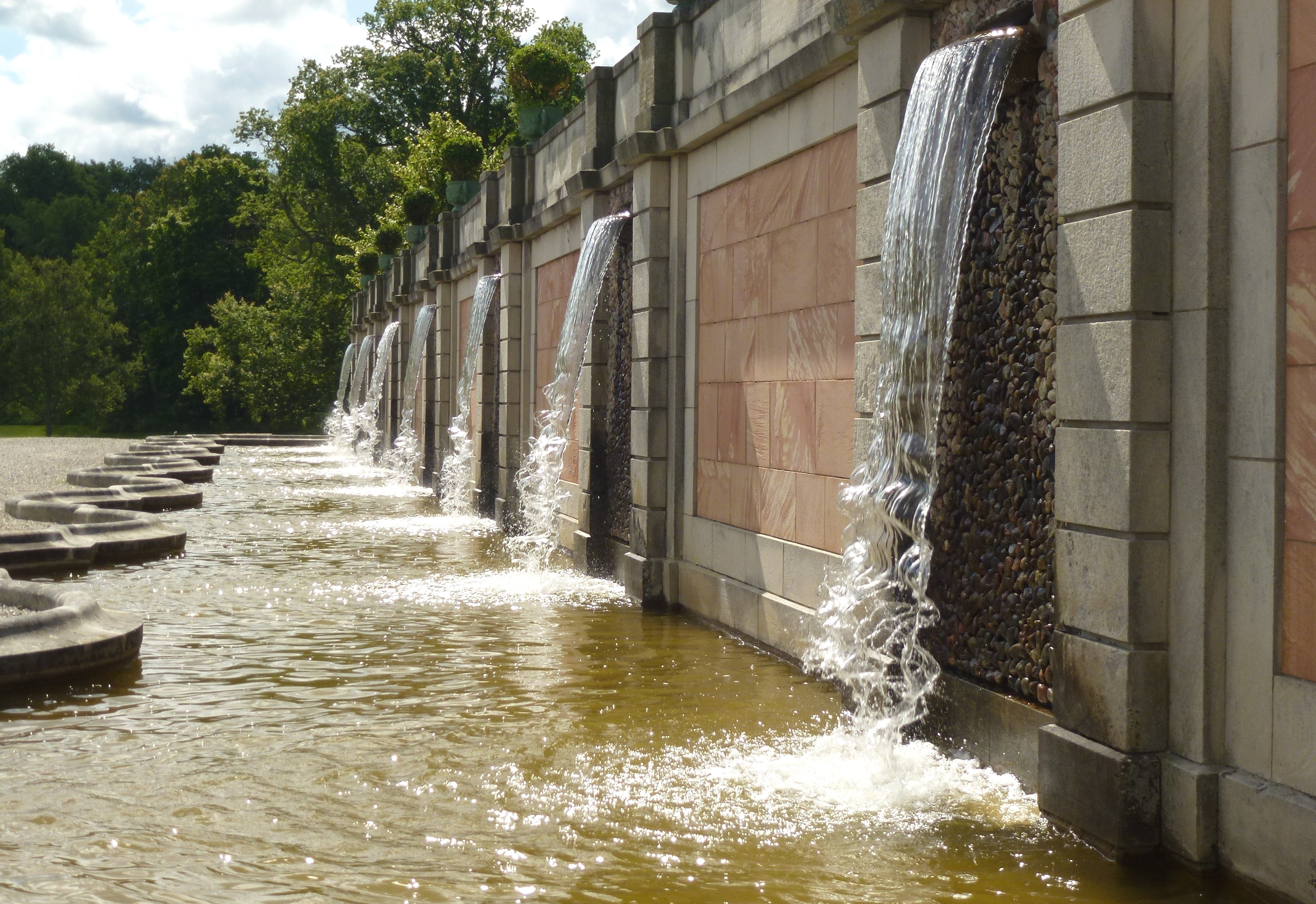 Drottningholm Kaskaderna